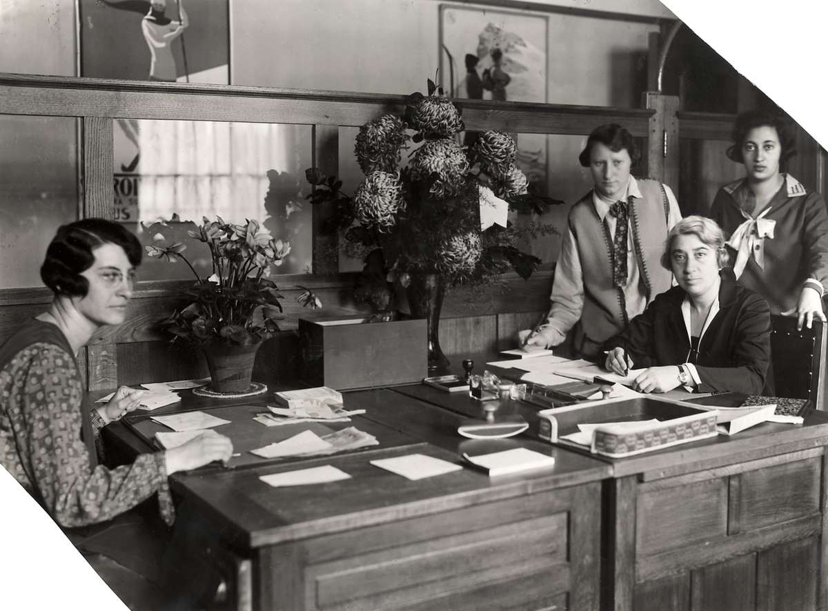 De 'Vrouwenbank' een kantoor opgericht door de Rotterdamse Bank. De Bank had enkel vrouwelijke clienten, en het personeel bestond uit vrouwen. Foto: Directrice Clara Meijers en Mevr. Mr. C. Kleinhoonte de procuratiehoudster, alsmede enkele personeelsleden. De Bank werd op 1 november 1928 opgericht en zou tot 1971 blijven bestaan, Amsterdam, Nederland 1928.